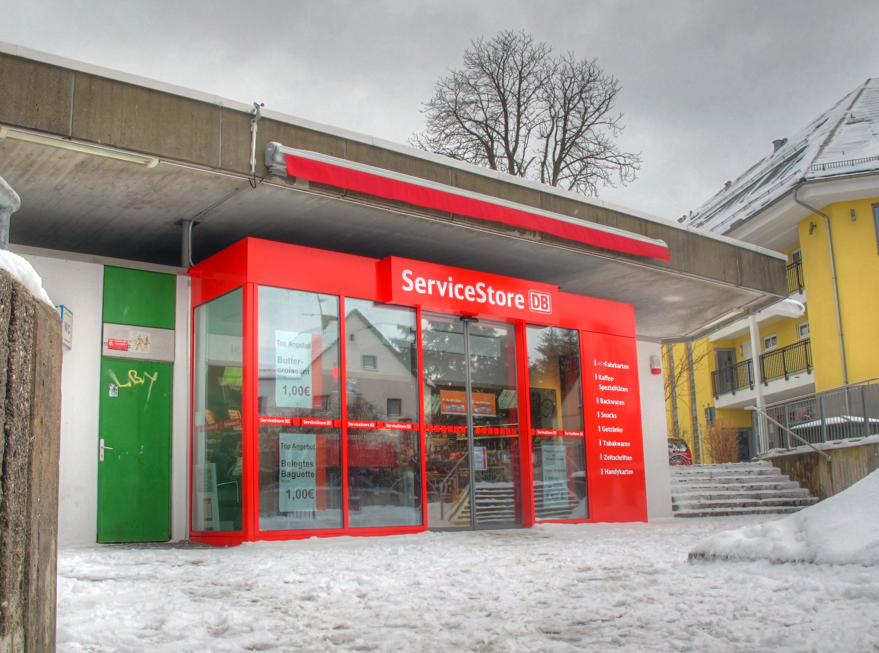 Deutschland, Bayern, Landkreis Fürstenfeldbruck, Gröbenzell, DB ServiceStore an der S-Bahn-Haltestelle